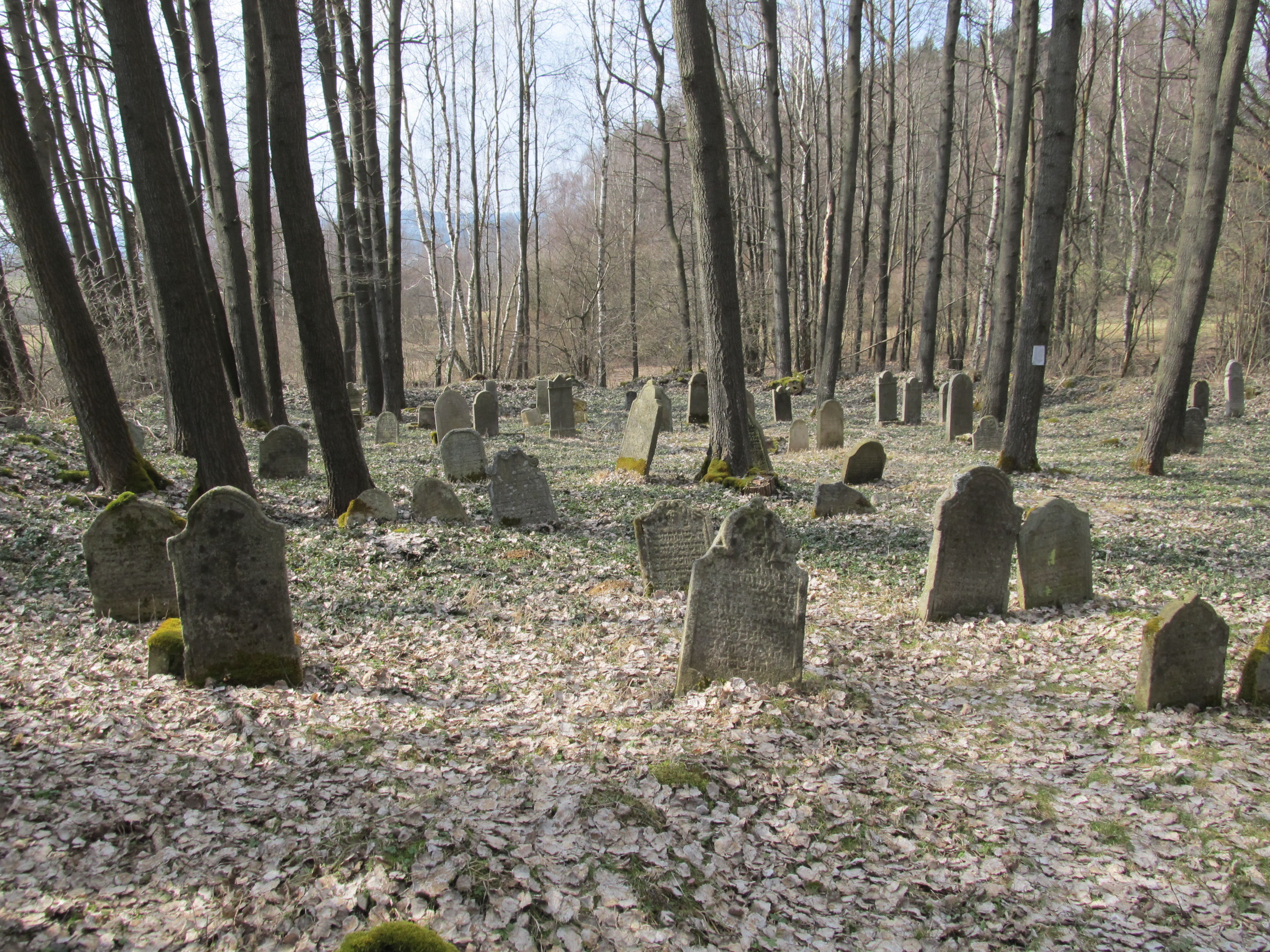 Pořejov ŽH 01